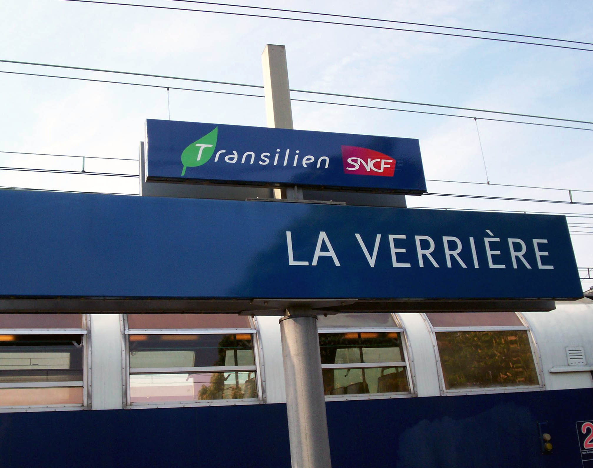 Signalétique, plaque de gare à La Verrière